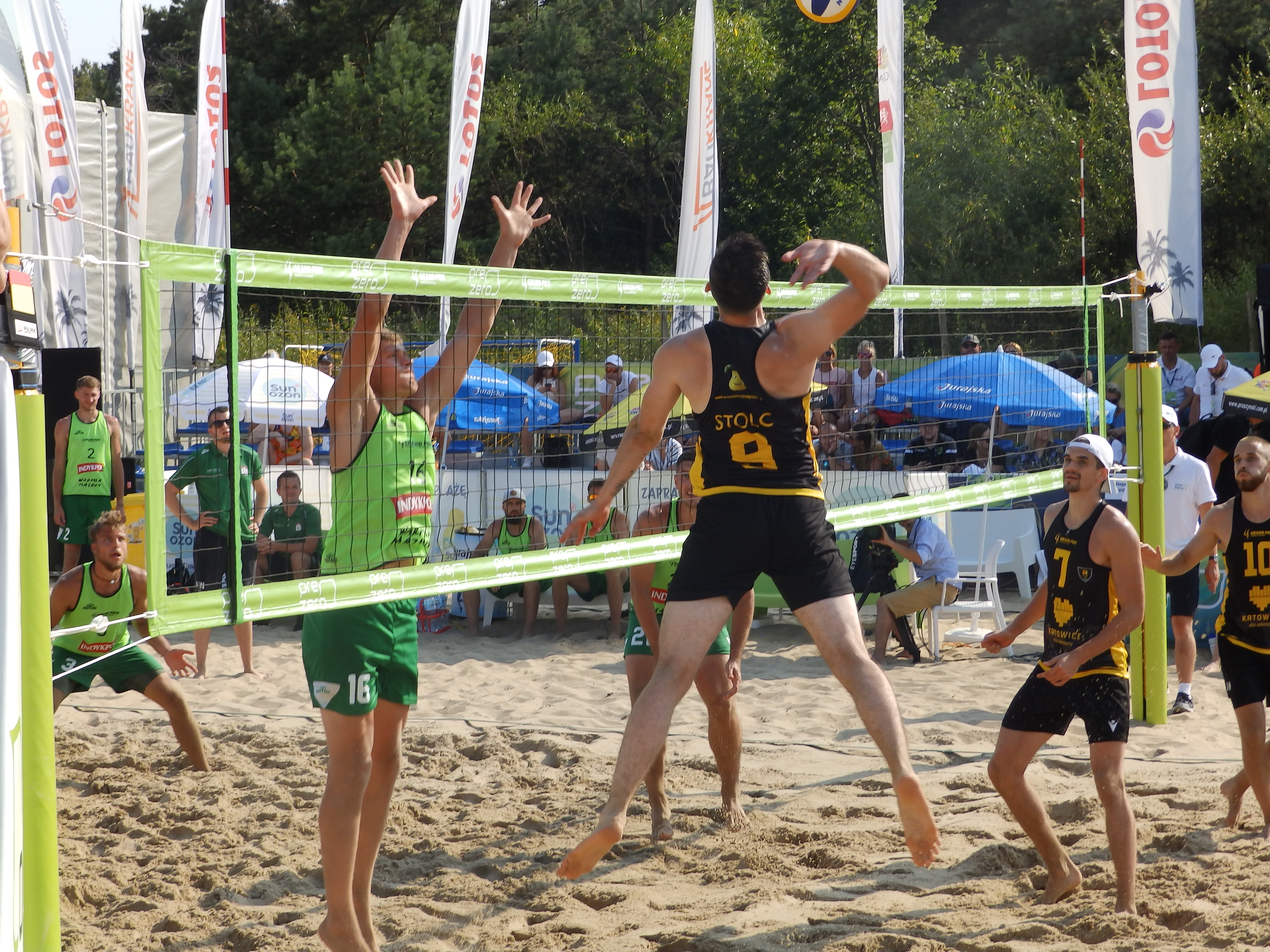 Siatkówka - Gdańsk 9.09.2020